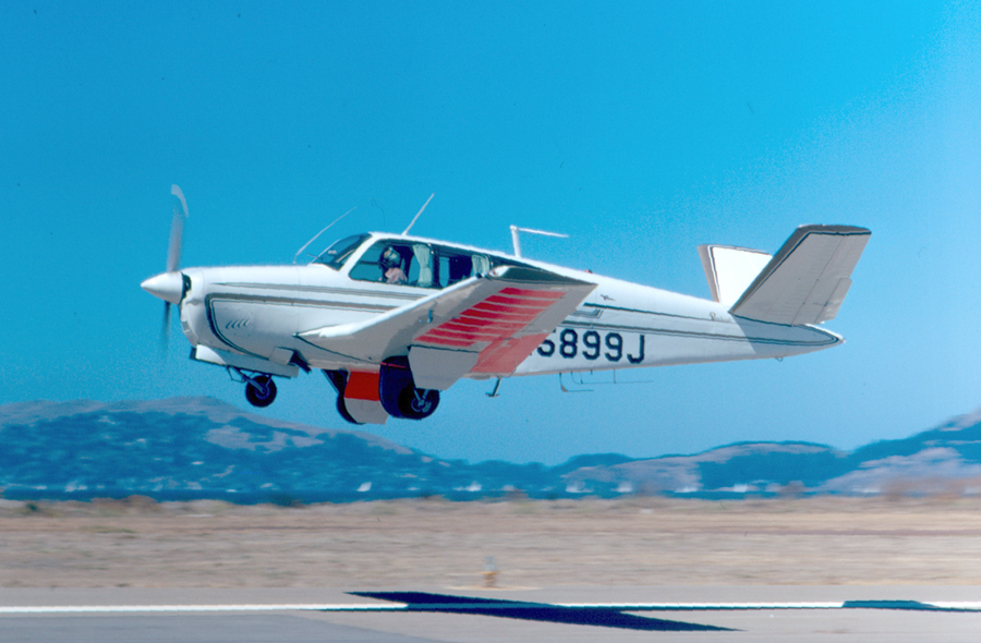 Beech S35 Bonanza at Crissy Field, 1972.